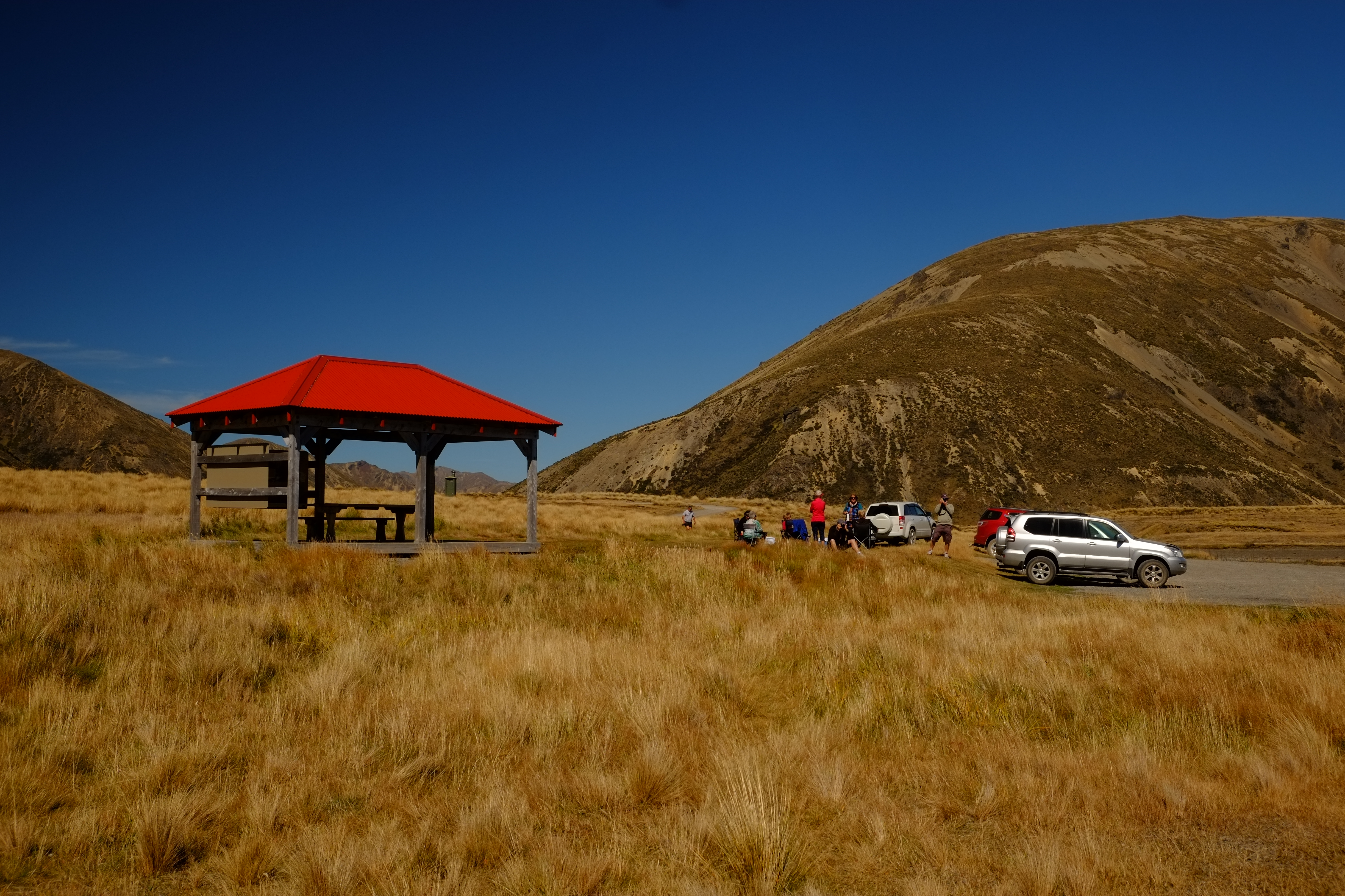 Lake Tennyson